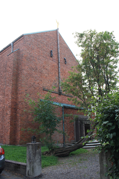 Emanuel Vigelands Museum i 2013